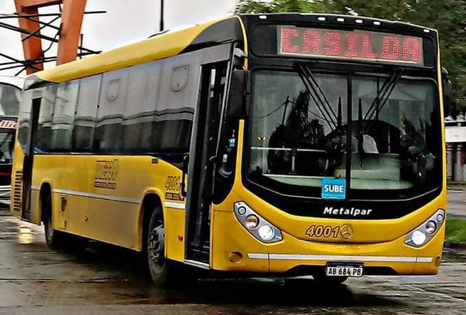 Mercedes-Benz O-500 de la línea 149, actualmente conocida como 33/9. Es administrada por una UTE de Rosario Bus.